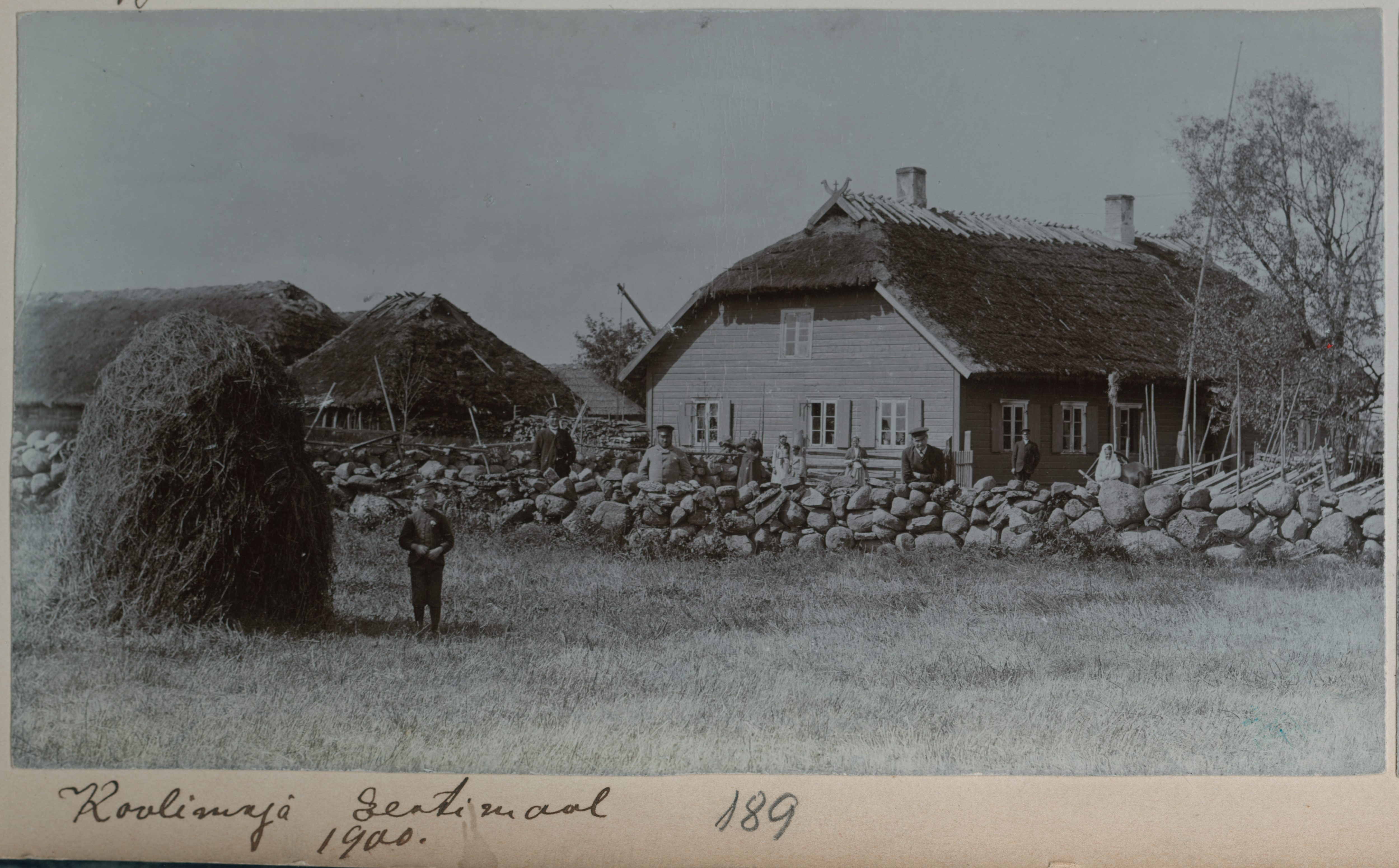 Peningi koolimaja - poolkelp-õlgkatusega ja kahe korstnaga hoone.